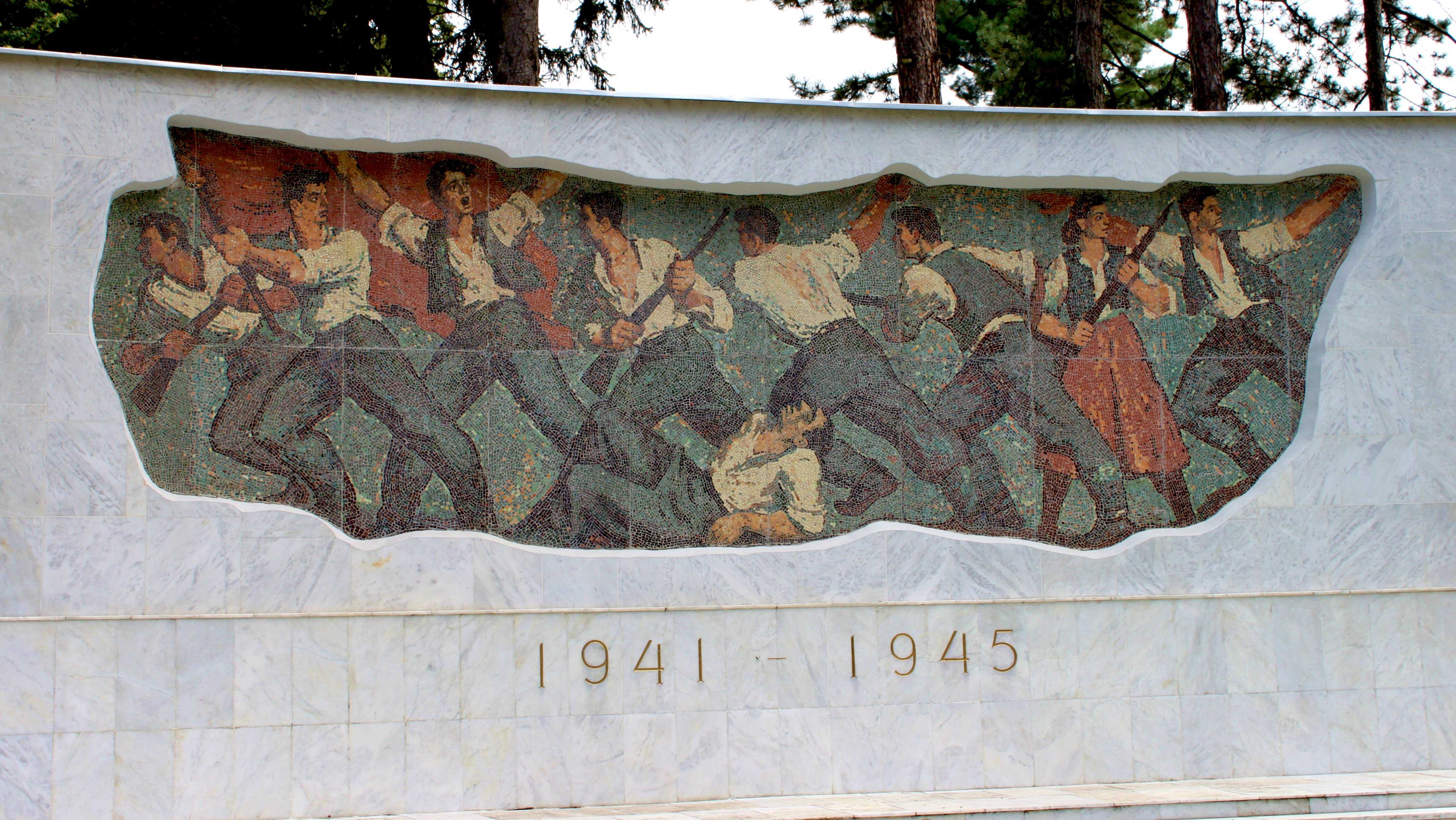 Spomenik revoluciji u Ivanjici